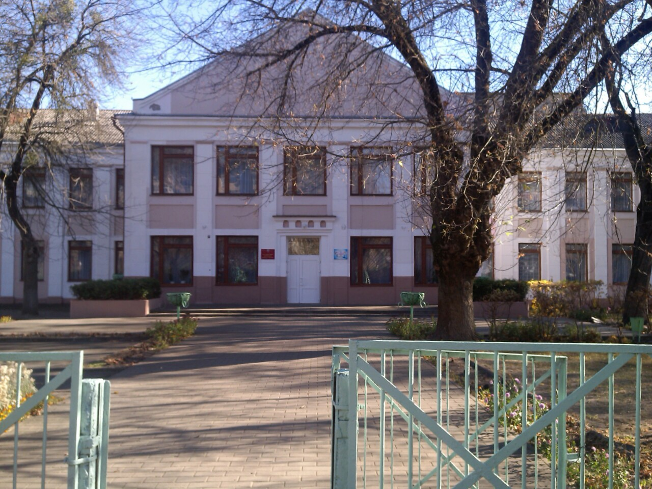 Центр Творчества